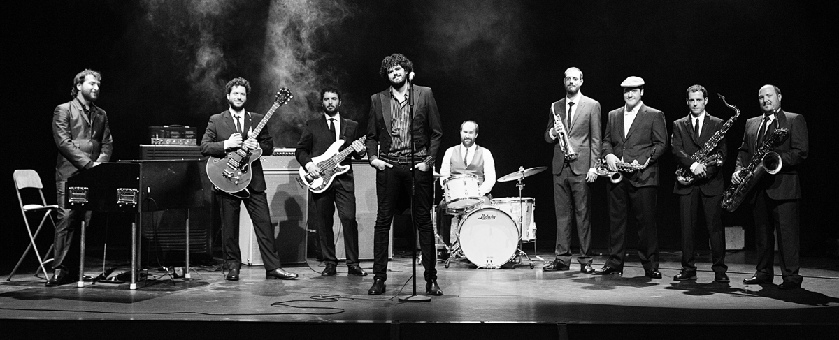 Foto de la Priscilla Band